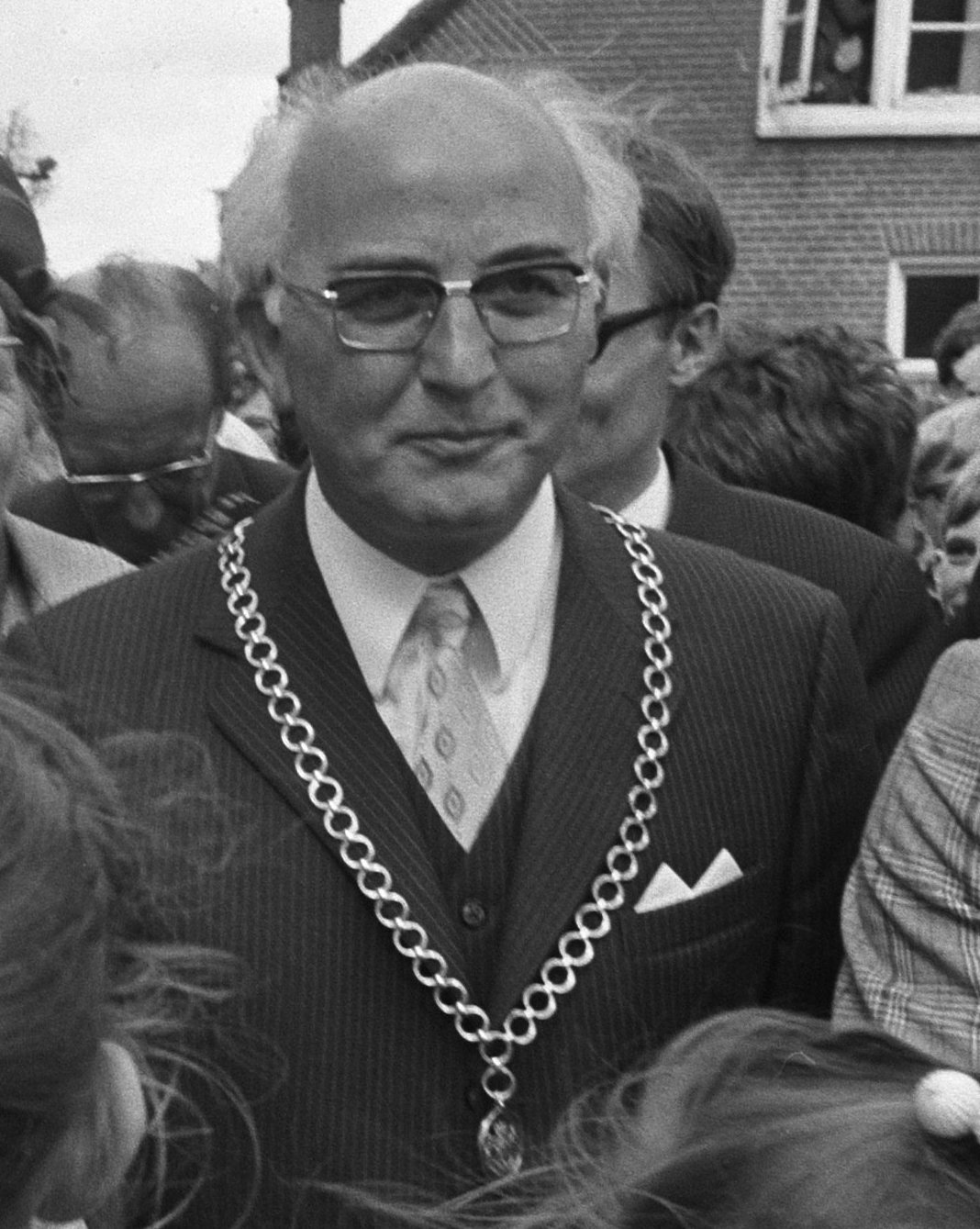 Koningin Juliana o.a. in gezelschap van de burgemeester van Kockengen